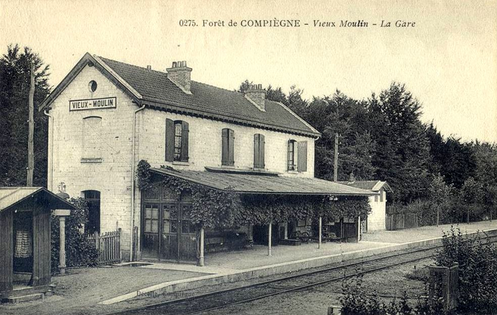 La halte de Vieux-Moulin, en pleine forêt. Il n'y a que la voie principale.